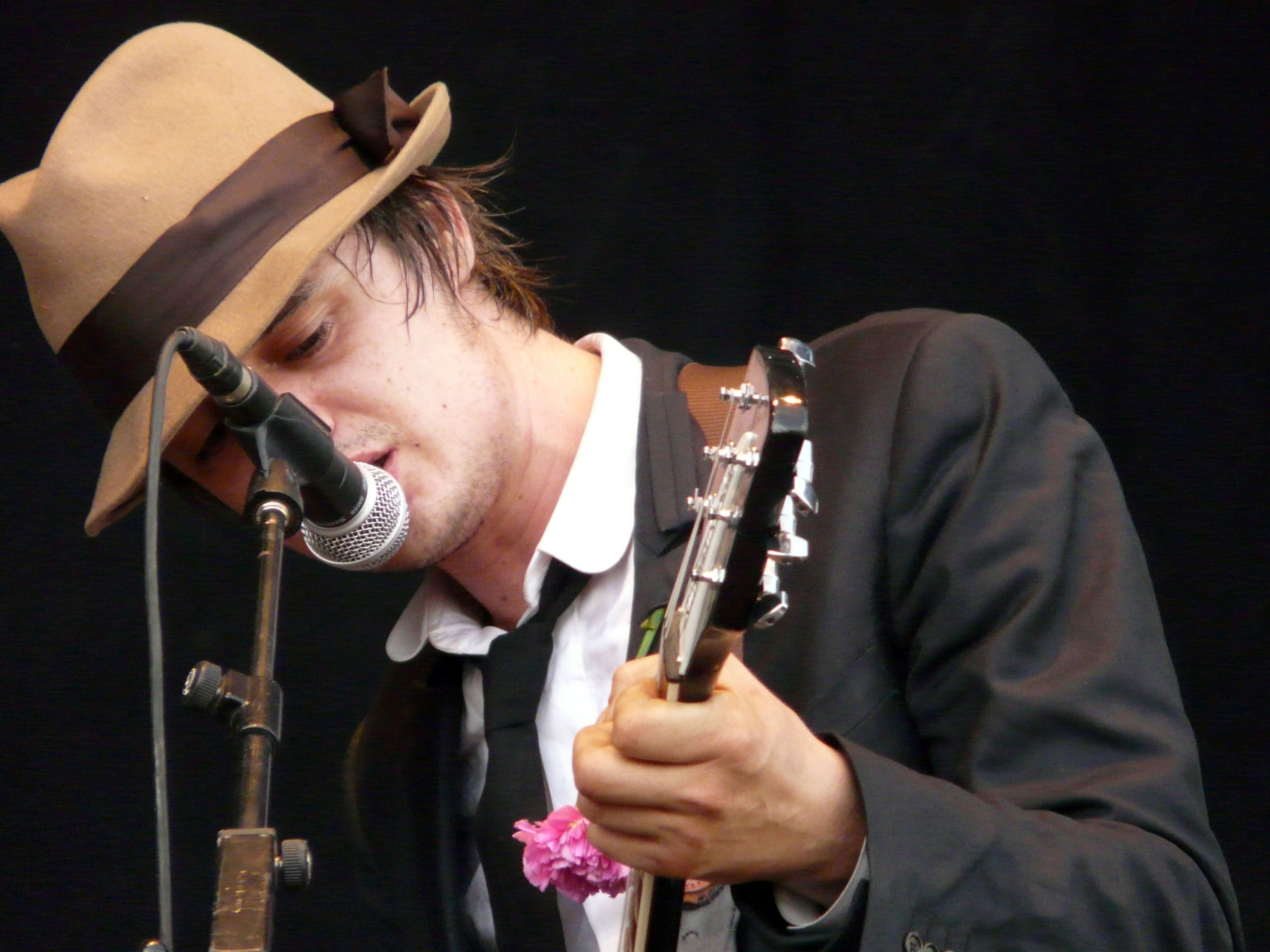 Pete Doherty, de Babyshambles, durante su actuación en el Saturday Night Fiber del 19 de julio de Madrid.